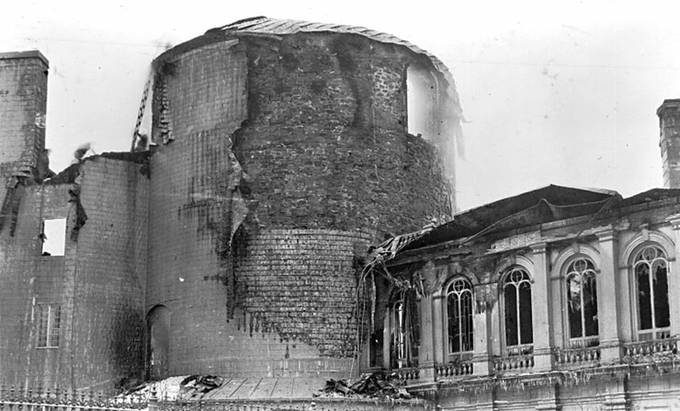 L’incendie de Notre-Dame de Québec « Dans la nuit du 22 décembre 1922, une catastrophe frappe la basilique-cathédrale Notre-Dame de Québec. Un incendie détruit de fond en comble le temple historique. Une enquête démontrera que le feu avait été allumé par un pyromane américain, Ray Marsden. Heureusement, peu de temps après, l’église est reconstruite quasiment à l’identique. Encore aujourd’hui, elle épouse donc la volumétrie que lui avait donnée l’ingénieur militaire Gaspard-Joseph Chaussegros de Léry entre 1743 et 1749. Pour bien saisir l’ampleur de la destruction de 1922, deux clichés saisis par un photographe amateur nous montrent le clocher de l’église gisant au beau milieu de la rue De Buade, de même que l’abside en hémicycle, vue depuis l’entrée du Palais épiscopal de la rue Port-Dauphin, flanquée à gauche par le presbytère et à droite par le passage qui menait à l’archevêché. » – Société historique de Québec